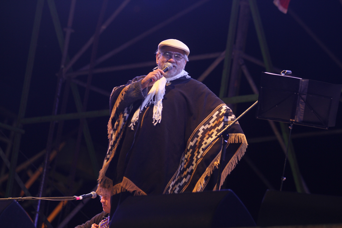 Humberto Waldemar Asdrúbal Baeza Fernández, más conocido como Tito Fernández o El Temucano (Temuco, 9 de diciembre, 1940), es un cantautor y folclorista chileno, autor de más de cuarenta discos publicados desde principios de la década de 1970 hasta la actualidad. III Feria Costumbrista 2012